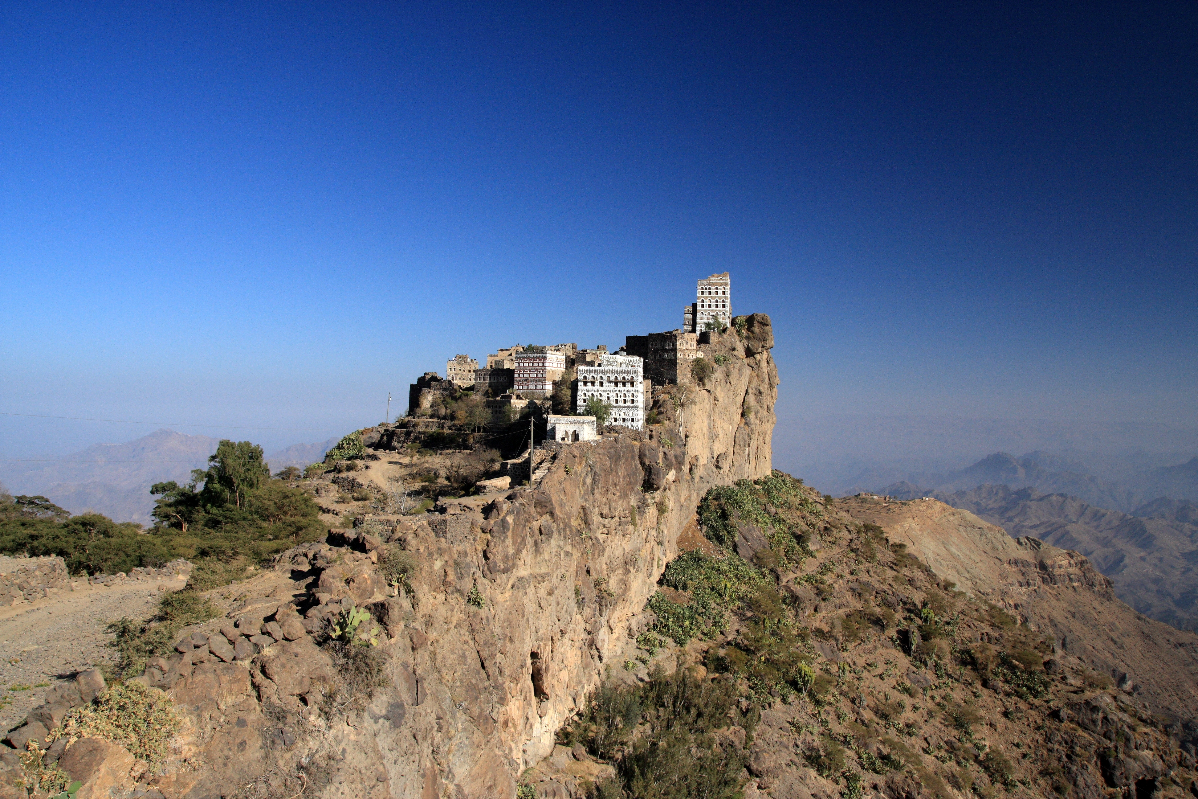 Kahil, Haraz Mountains, Yemen